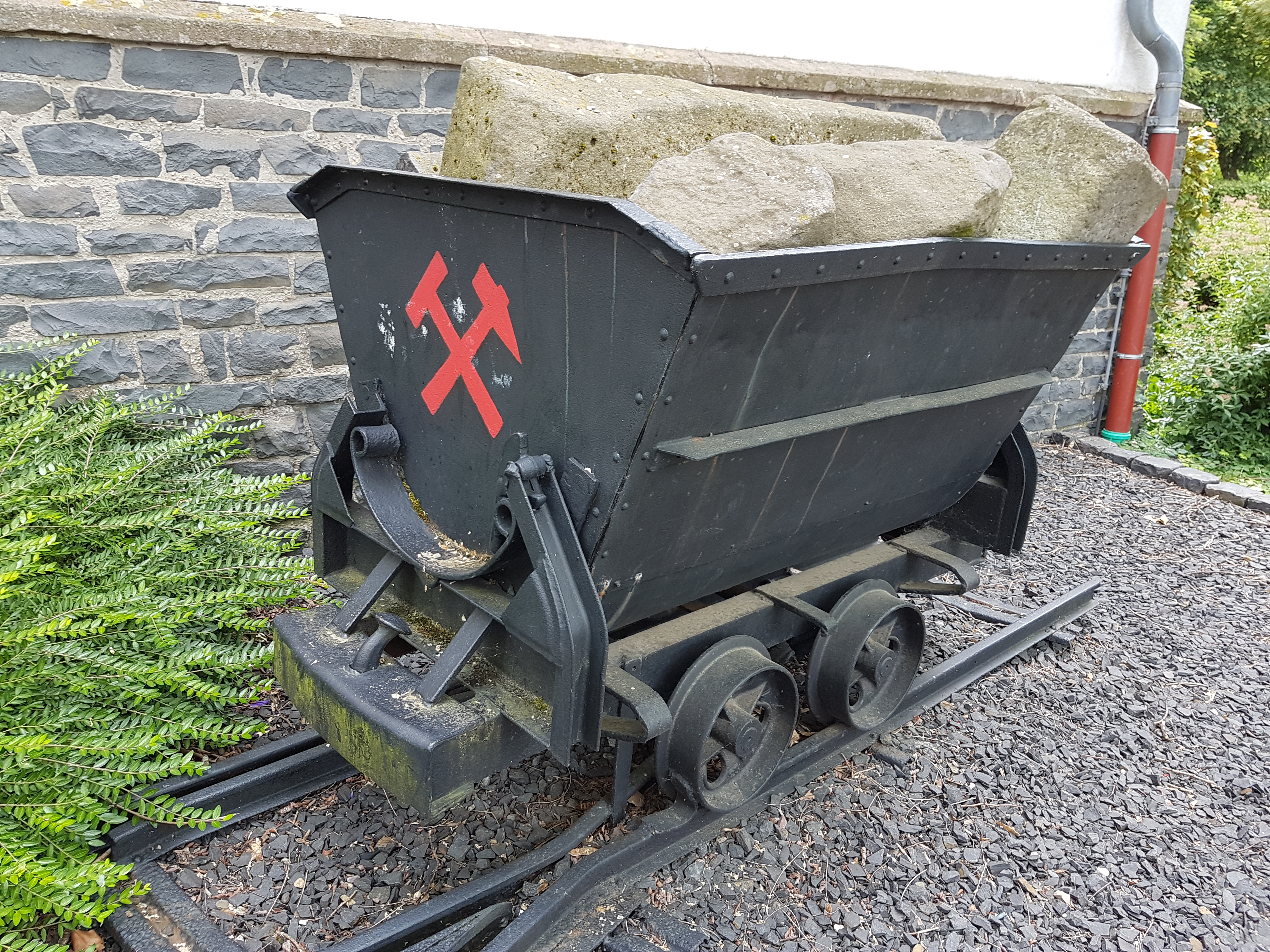 Obertiefenbach (Beselich) – Heimatmuseum – Eine Güterlore zeugt von der Bergbautätigkeit in Beselich-Obertiefenbach